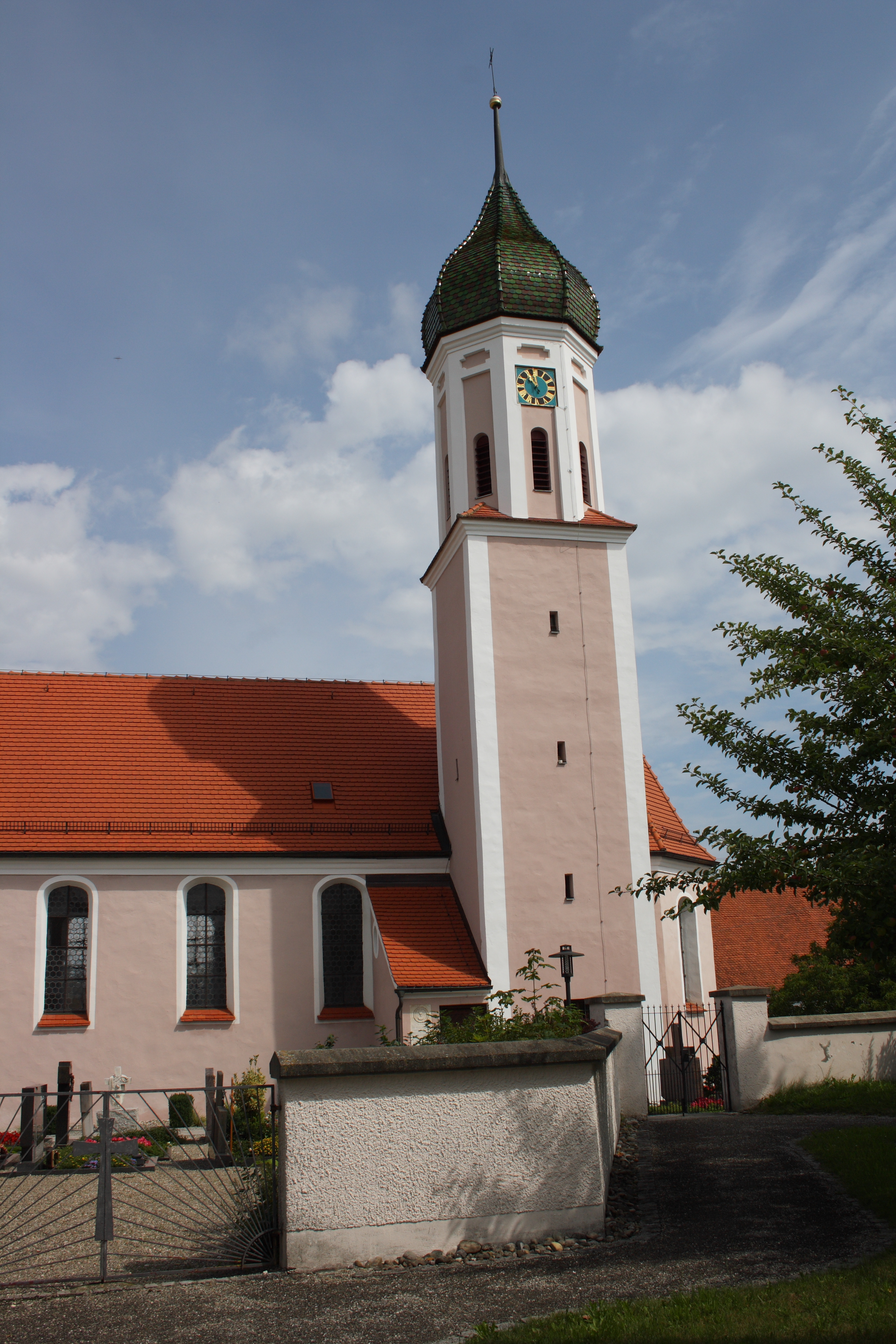 Katholische Pfarrkirche St. Nikolaus in Rechbergreuthen, einem Ortsteil von Winterbach im Landkreis Günzburg (Bayern), Saalbau von 1681/82, Turm mit Zwiebelhaube